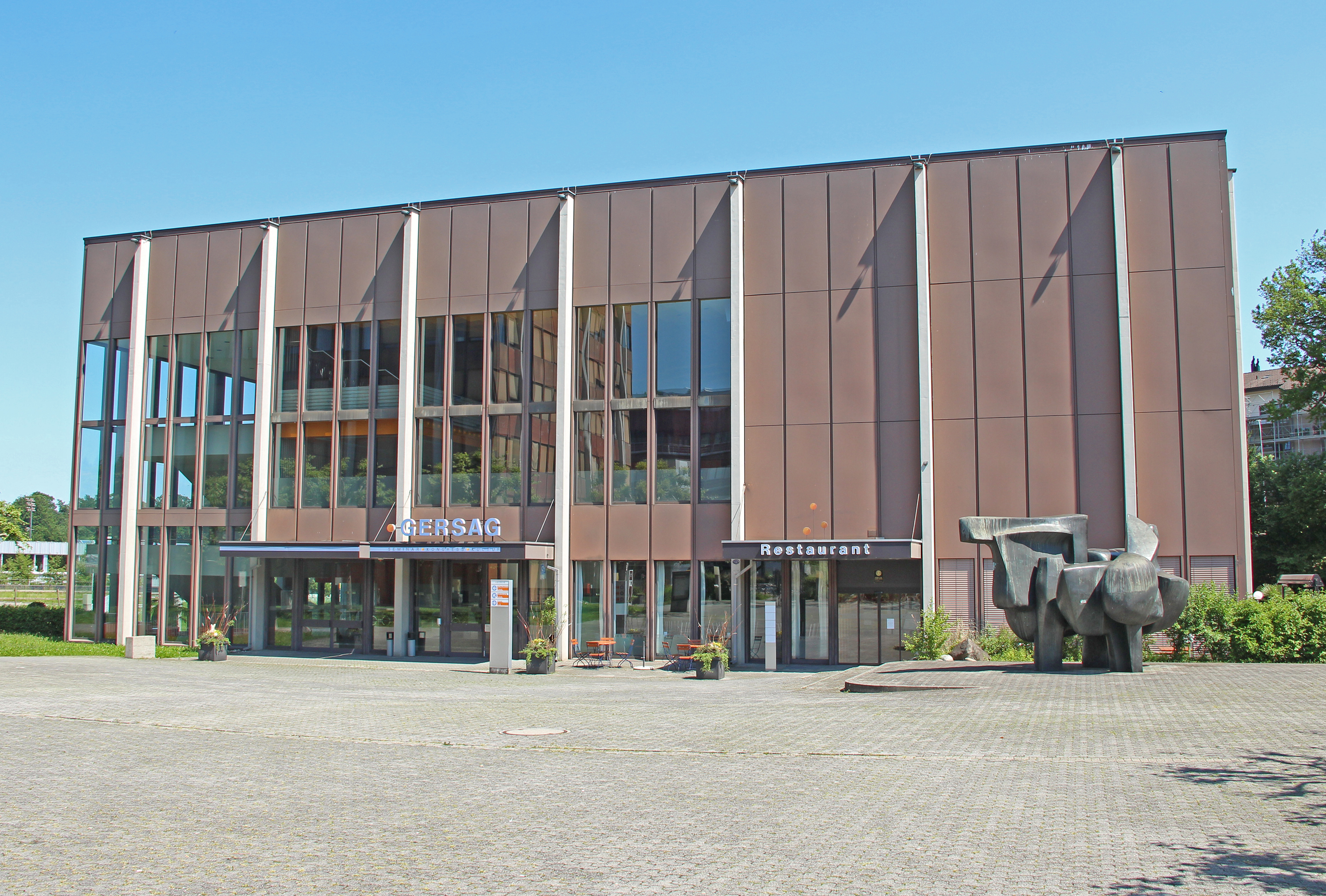 Das Kongresszentrum Gersag in Emmenbrücke aus den Siebziger Jahren wird für Le Théâtre einer Sanierung unterzogen.